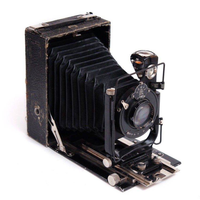 Советский пластиночный складной фотоаппарат Фотокор-1